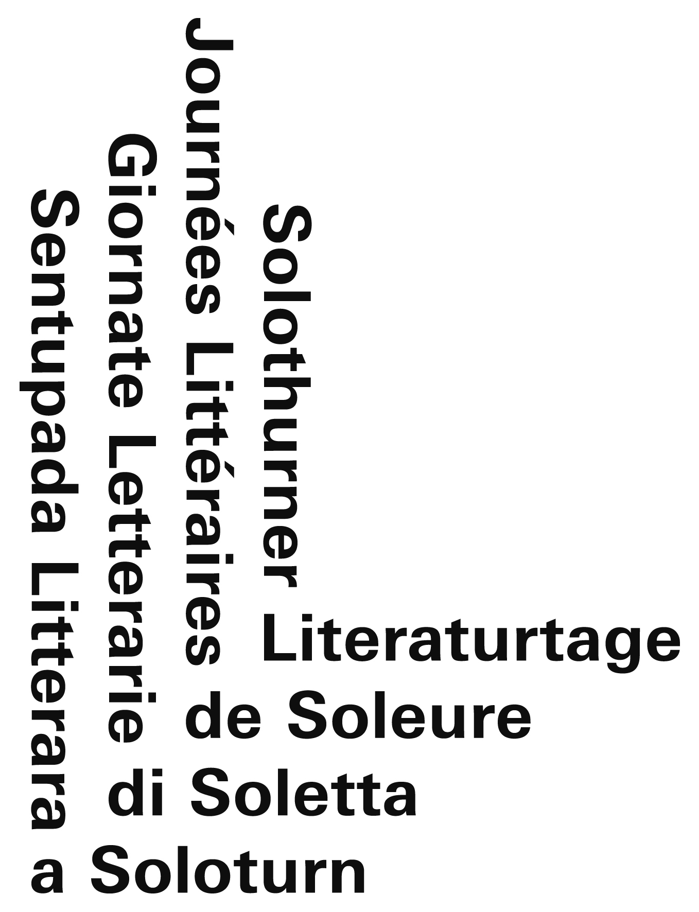 Schriftmarke Solothurner Literaturtage